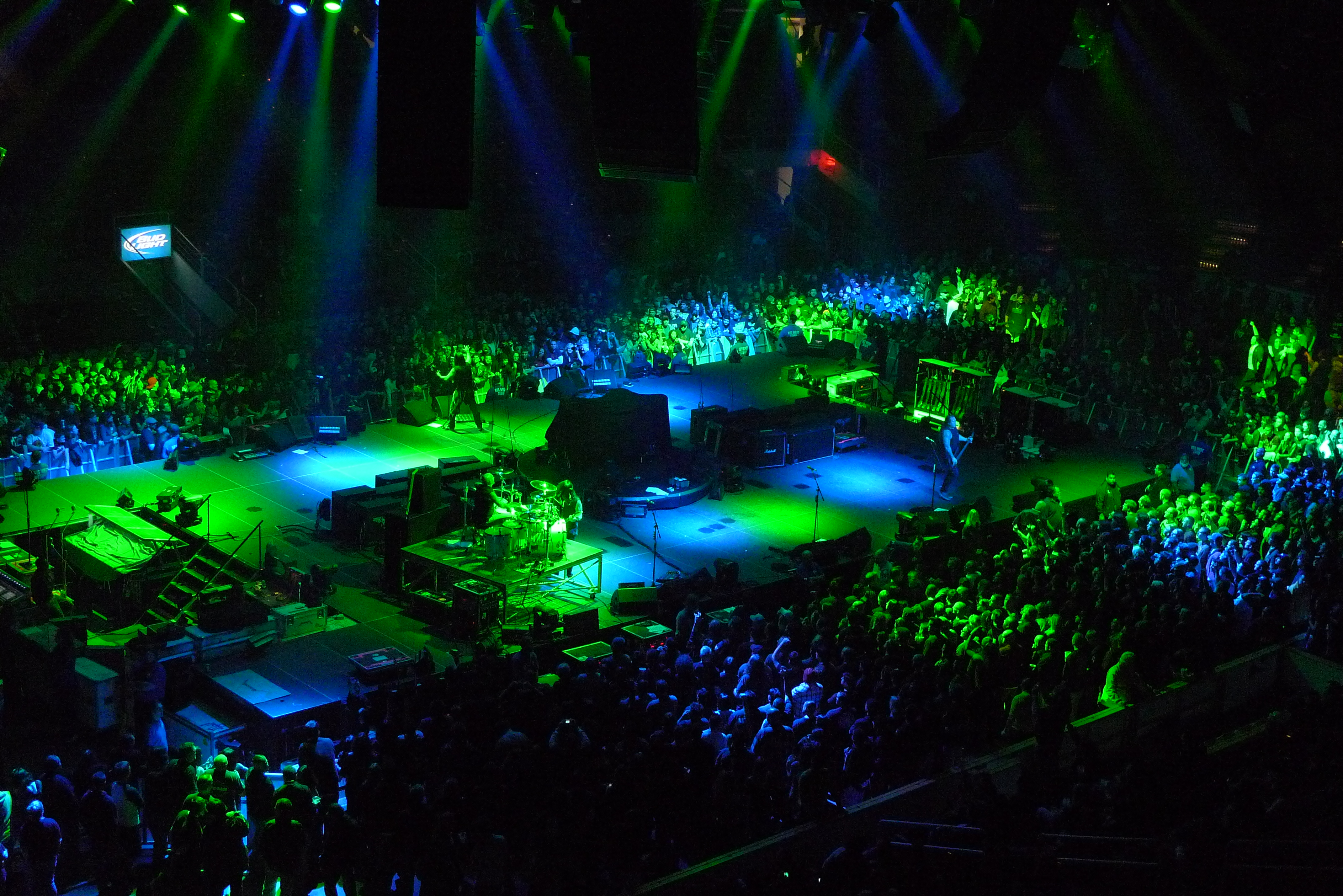 I Machine Head in concerto il 13 dicembre 2009